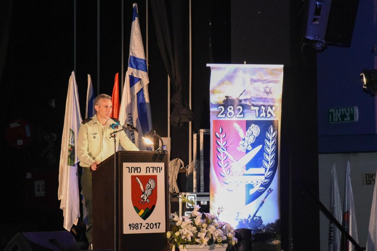 טקס סגירת יחידת מיתר